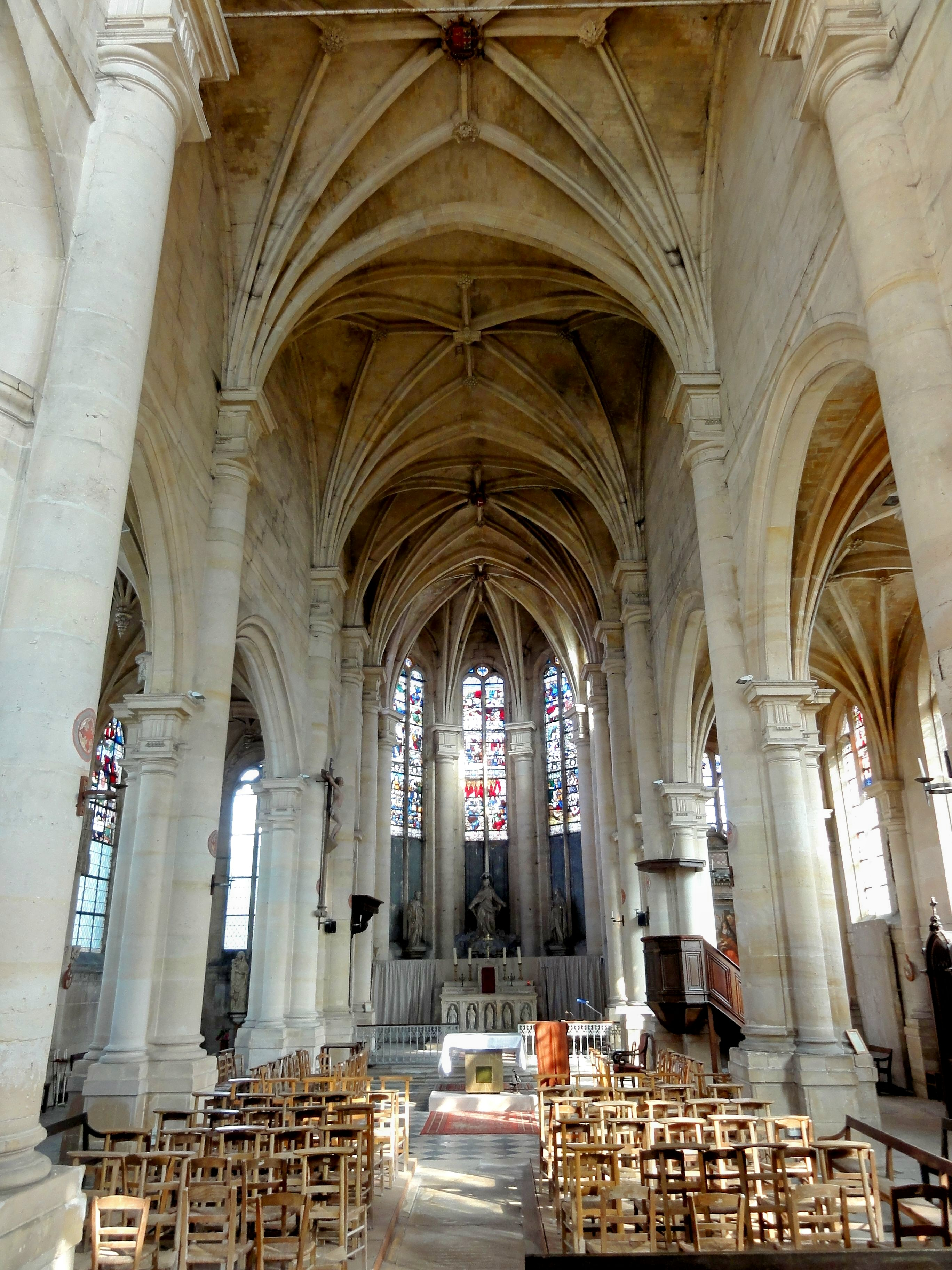 Vue générale de l'intérieur.